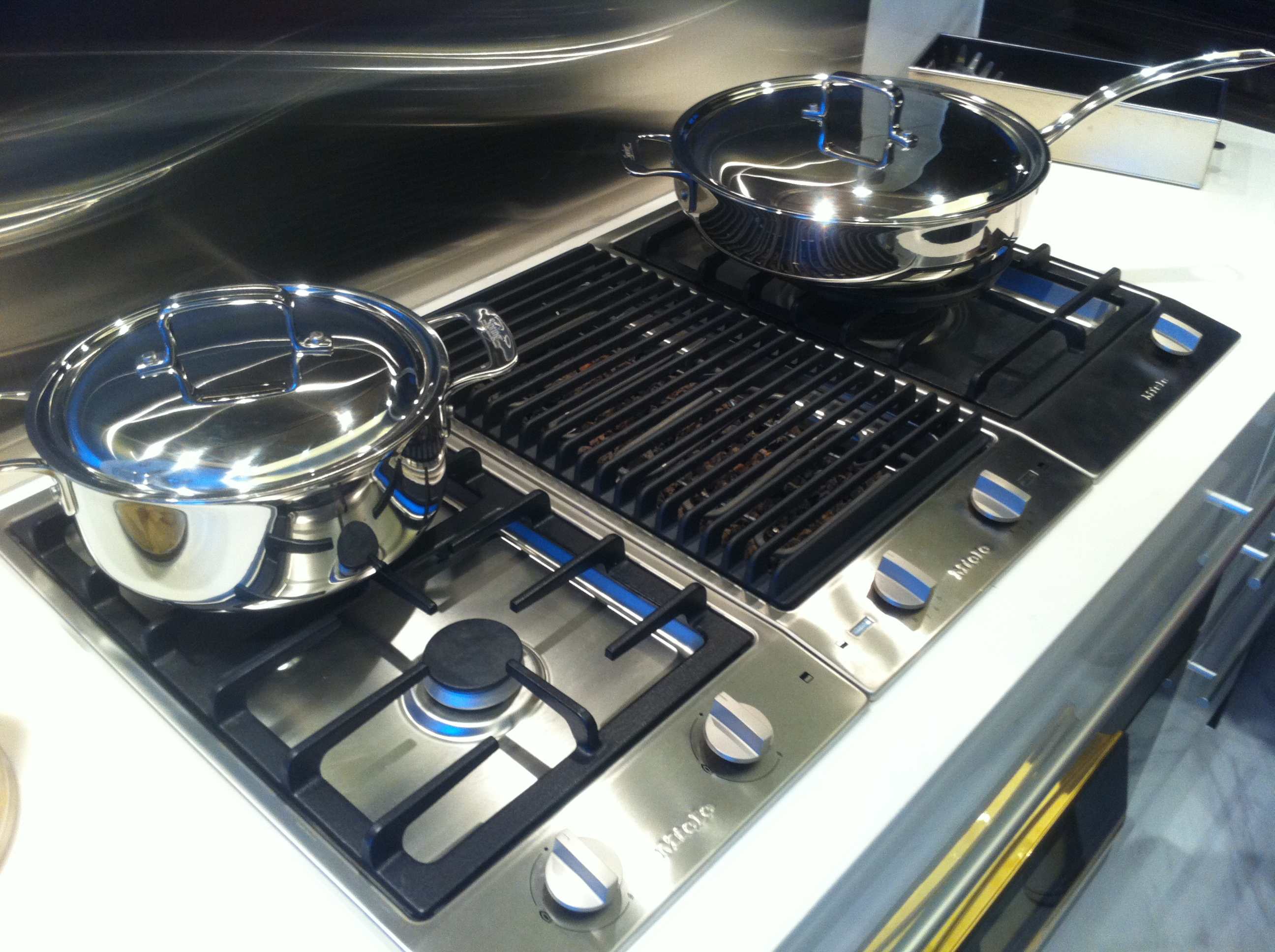 中文（香港）: 深灣9號zh:示範單位示品